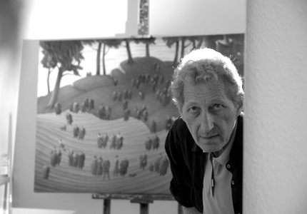 Werner Friedrichs,Portrait des Künstlers in seinem Atellier